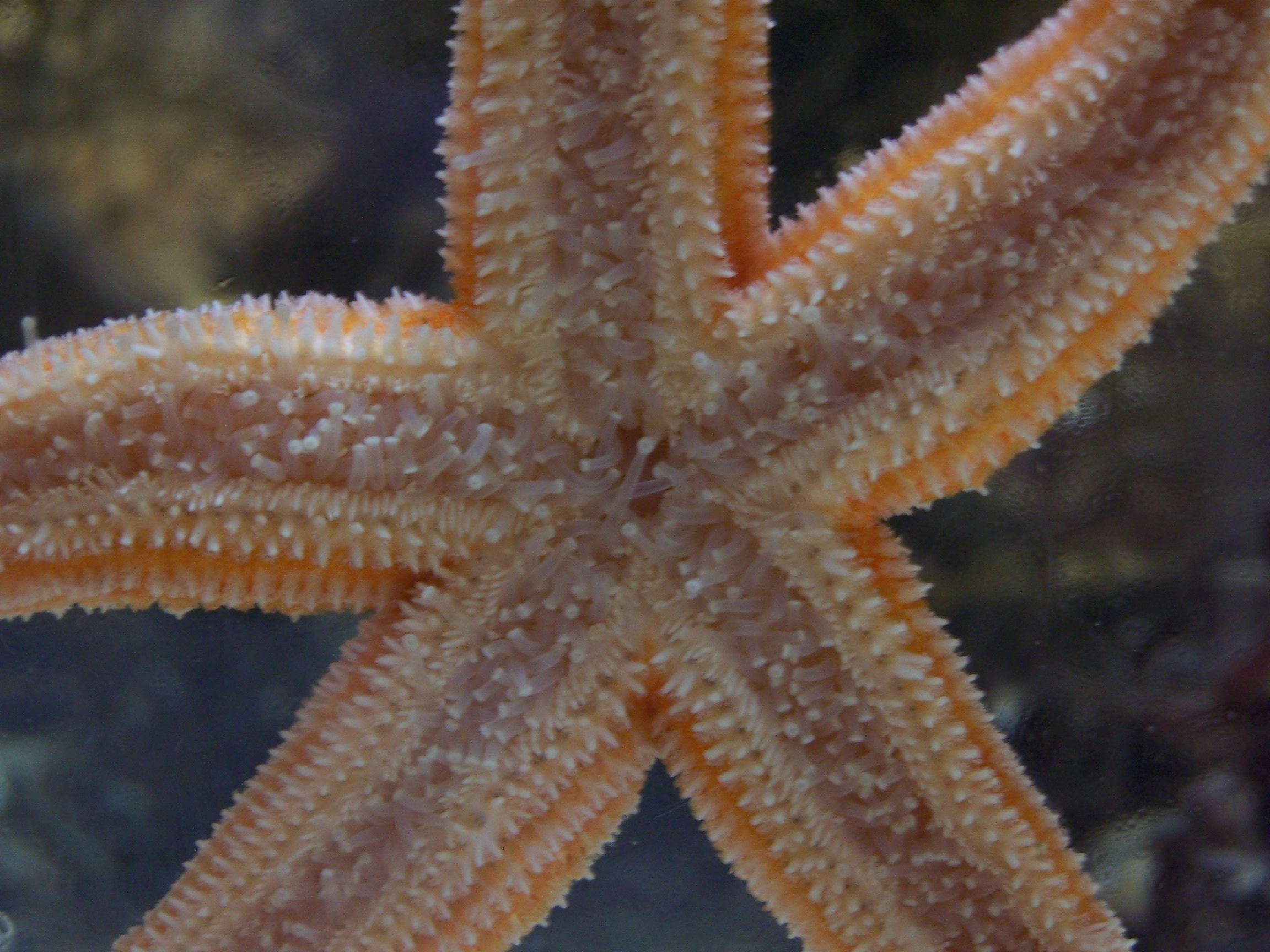 Photographie d'étoiles de mer communes (Asterias rubens) à l'Aquarium de La Rochelle.